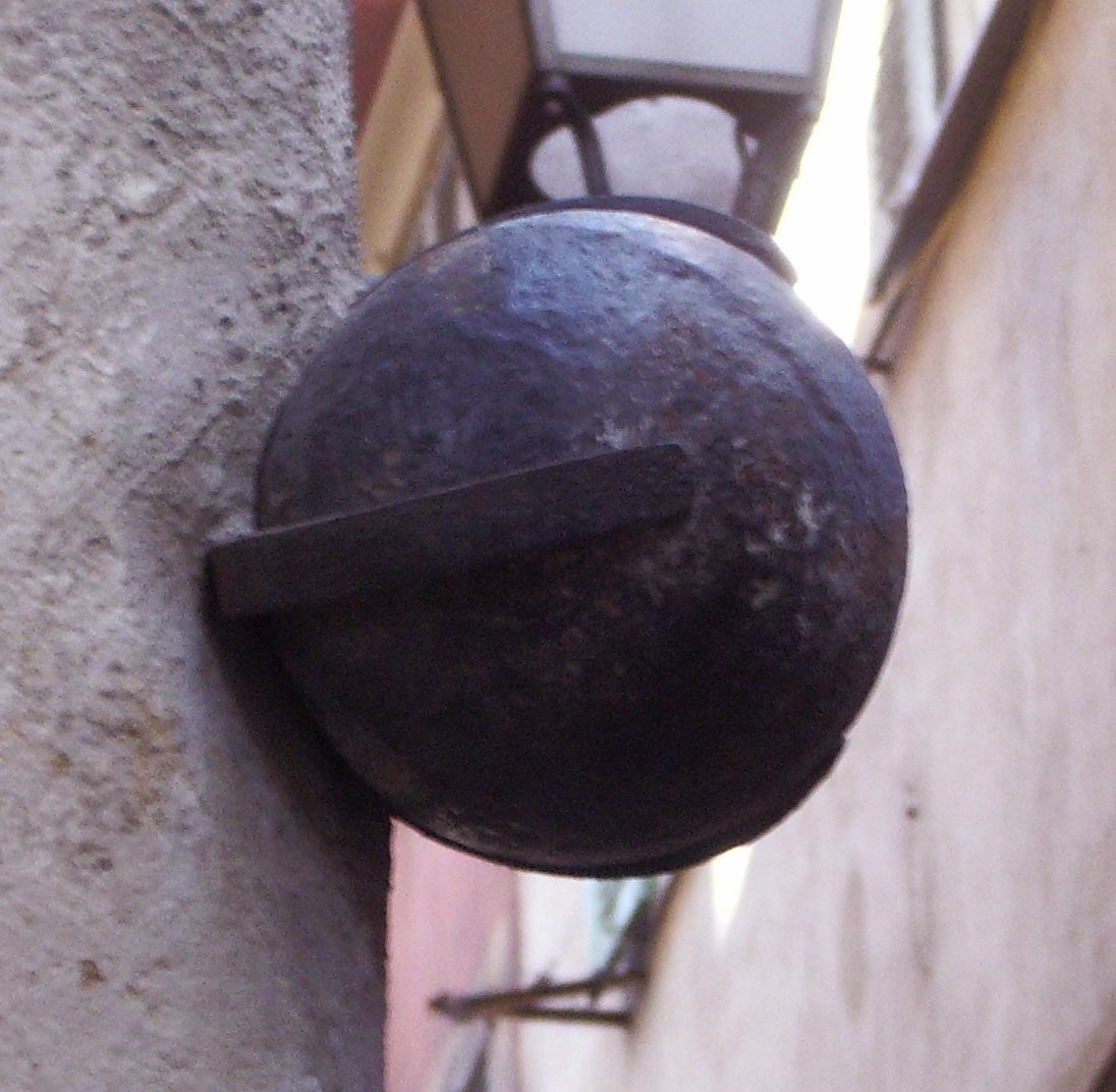 Boulet tiré par la flotte franco-turc en 1543 et scellé en souvenir à l'angle de la rue droite et rue de la Loge dans le vieux Nice.